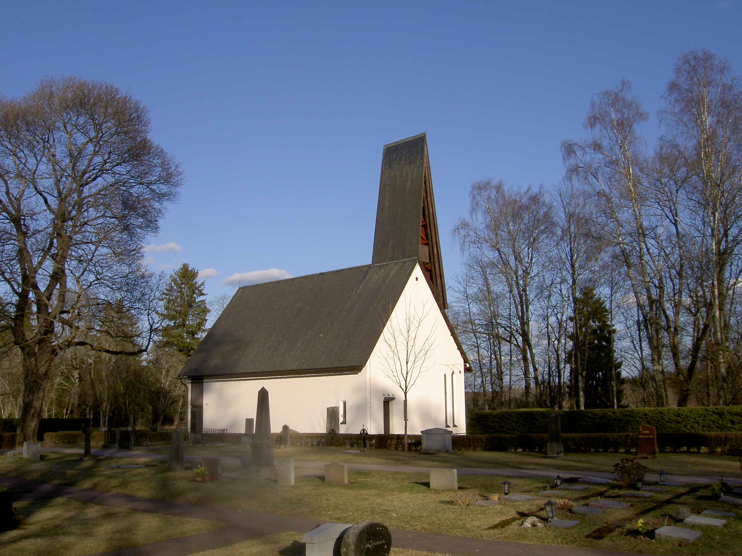 Säters gravkapell, vid Säters kyrkogård (som inte ligger i anslutning till Säters kyrka)